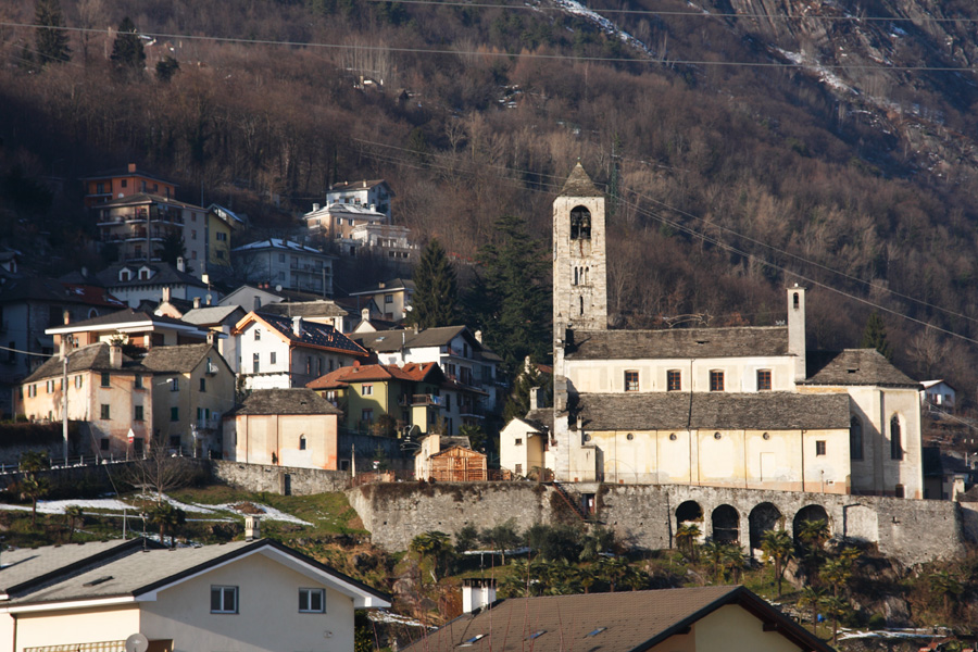 Scorcio di Crevoladossola con la Chiesa parrocchiale